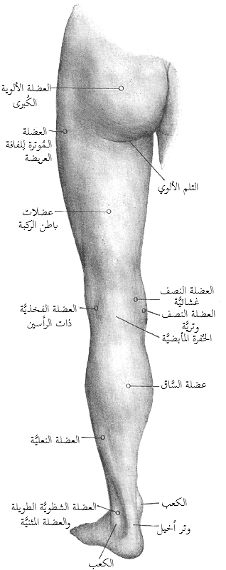 منظرٌ ورائيّ لِلقسم الخلفيّ السُفلي الأيسر عند الإنسان.